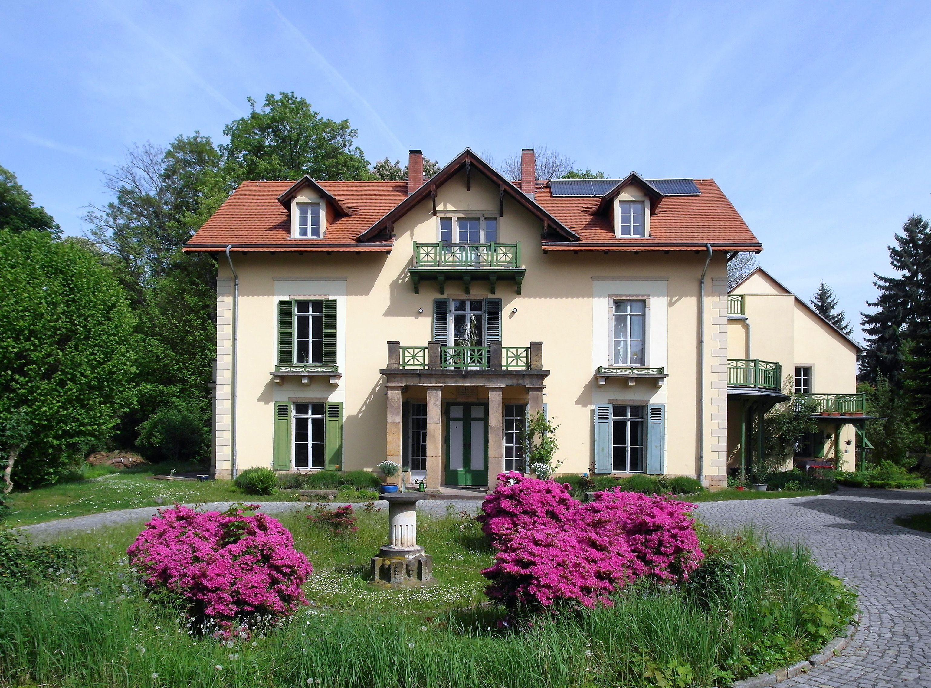 06.05.2014 01259 Dresden-Kleinzschachwitz: Putjatinstraße 26. Landhaus "Storchennest" des Fürsten Nikolai Abramowitsch Putjatin (GMP: 51.004692,13.847258). Der in Kiew geborene Fürst aus dem Herrscherhaus der Rurikiden mußte nach einem Skandal den russischen Hof verlassen. So kam der Aristokrat nach Kleinzschachwitz und baute sich ab 1797 eine absonderliche Villa, auch um seiner lungenkranken Tochter gesunde Landluft zu bieten. 16 Balkone zierten das Haus, dazu eine große Dachterrasse; ein Turm, "Storchennest" genannt, diente der Wetter-Beobachtung, Zeitweise gab es eine Rutsche vom Obergeschoß in den Park. Die Welt verdankt Putjatin auch Erfindungen, wie etwa seine Sägemaschine für Würfelzucker. Der Mann sei doch reichlich "mentekapt" (hat nicht alle Tassen im Schrank), wird König Friedrich August I. von Sachsen zitiert. [SAM3849.JPG]20140506045DR.JPG(c)Blobelt